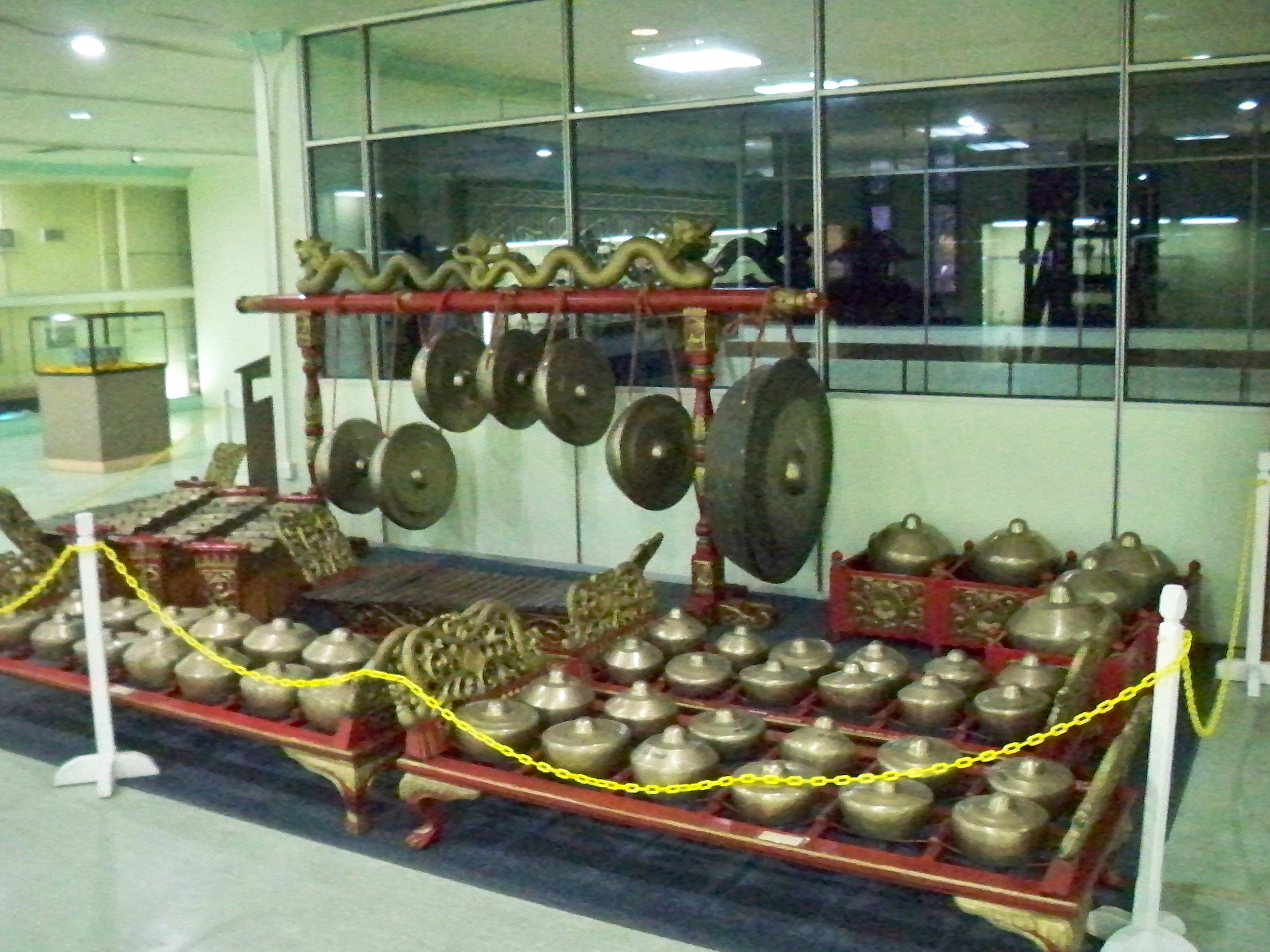 Гамелан